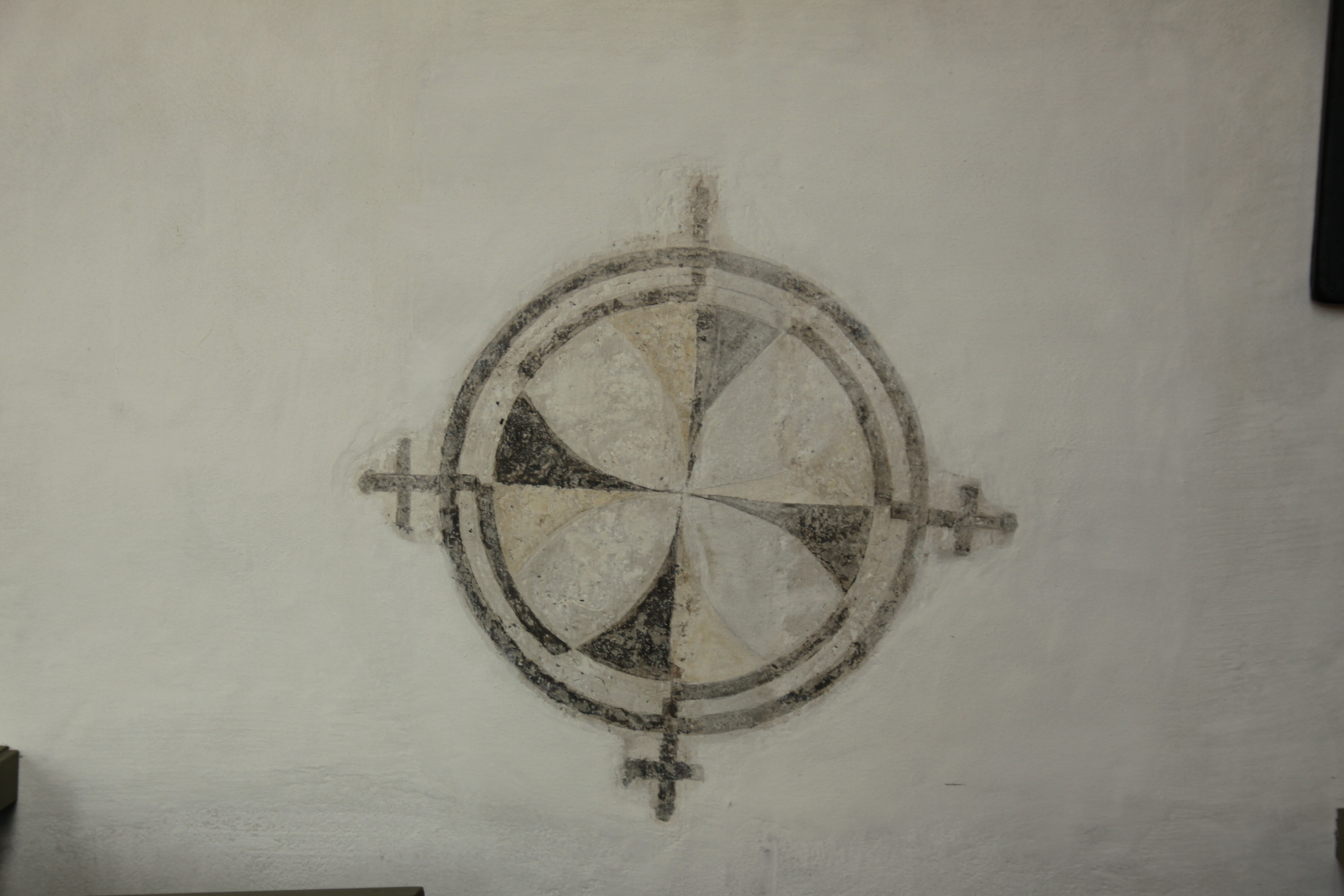 Mittelalterliche Malerei in Rysum